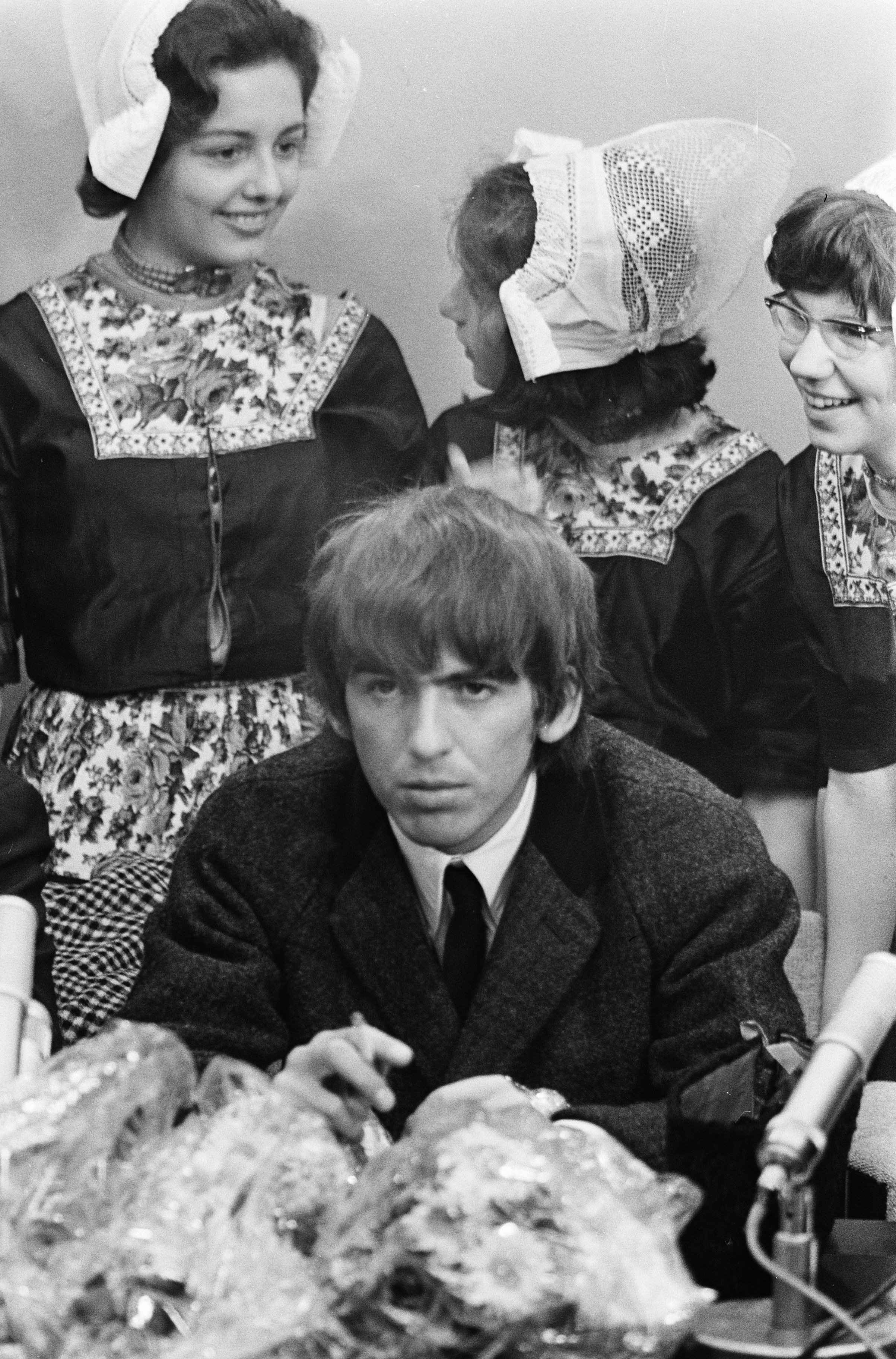 Collectie / Archief : Fotocollectie Anefo Reportage / Serie : [ onbekend ] Beschrijving : Aankomst Beatles op Schiphol, de Beatles tijdens persconferentie; George Harrison Datum : 5 juni 1964 Locatie : Noord-Holland, Schiphol Trefwoorden : aankomsten, klederdrachten, muzikanten, persconferenties, popgroepen, portretten Persoonsnaam : Harrison George Instellingsnaam : Beatles Fotograaf : Pot, Harry / Anefo Auteursrechthebbende : Nationaal Archief Materiaalsoort : Negatief (zwart/wit) Nummer archiefinventaris : bekijk toegang 2.24.01.05 Bestanddeelnummer : 916-5132